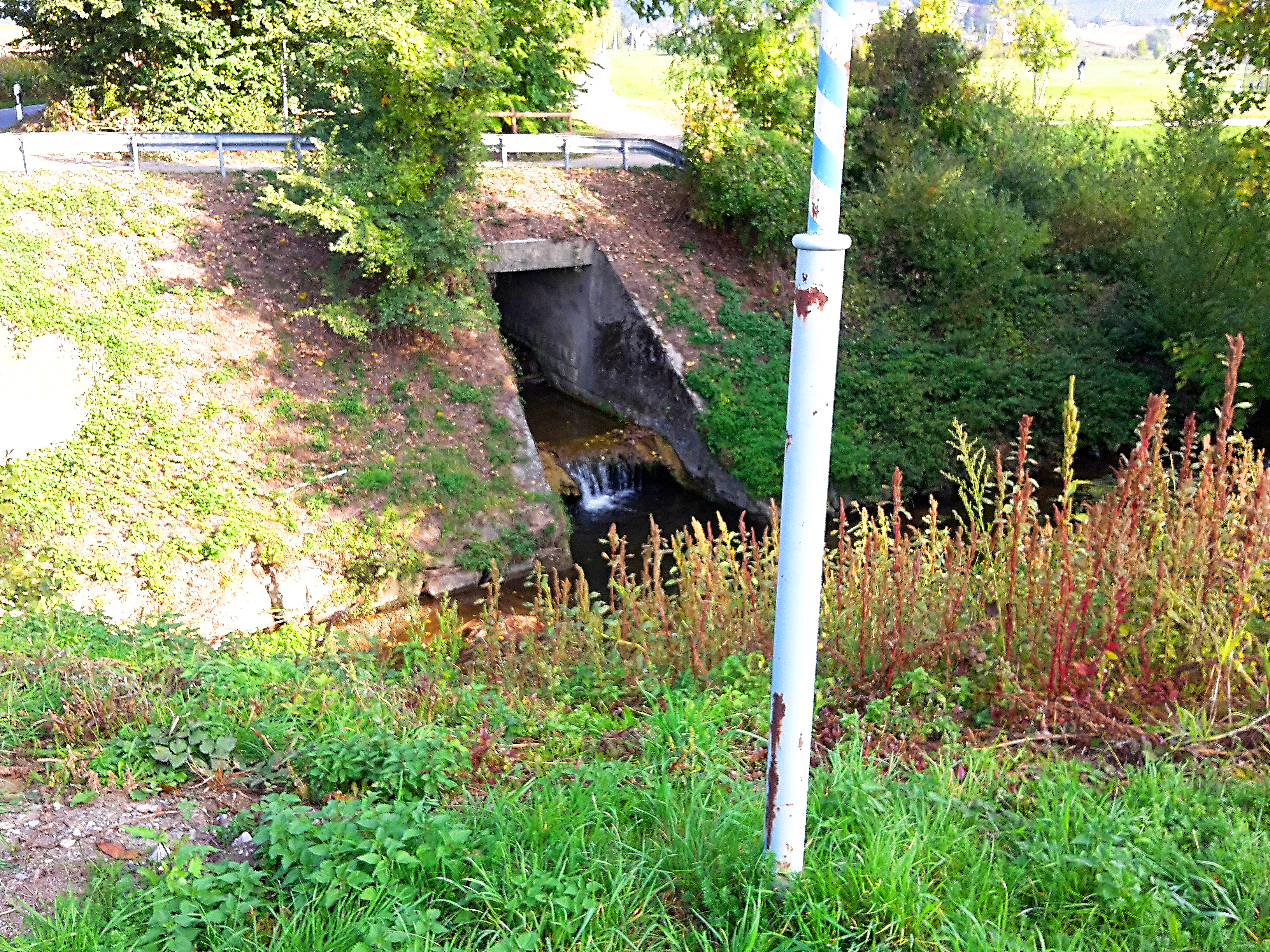 Mündung des Otelfinger Dorfbachs in den Furtbach